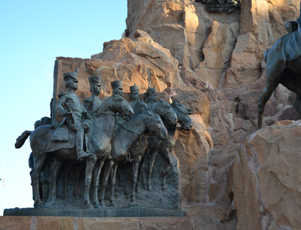 Monumento al Ejercito de los Andes (Cerro de la Gloria), realizado por Juan Manuel Ferrari (1874-1916). Detalle. Vista frente esquina inferior Este.